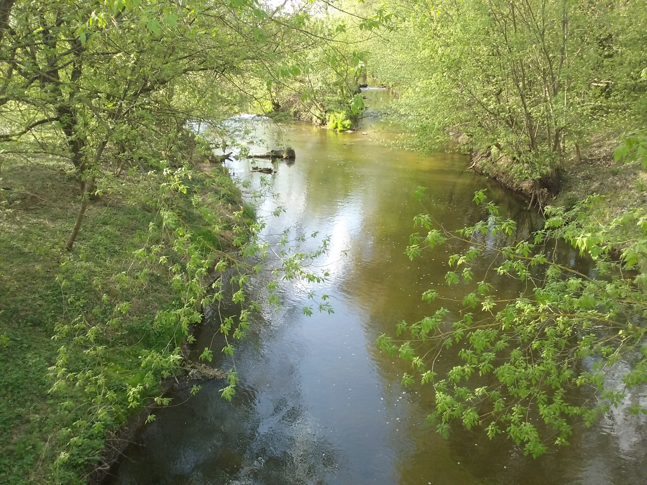 Tomaszów Mazowiecki w wijewództwie łódzkim, PL, EU. Rzeka Czarna uchodząca do rzeki Wolbórki w granicach Tomaszowa. CC0